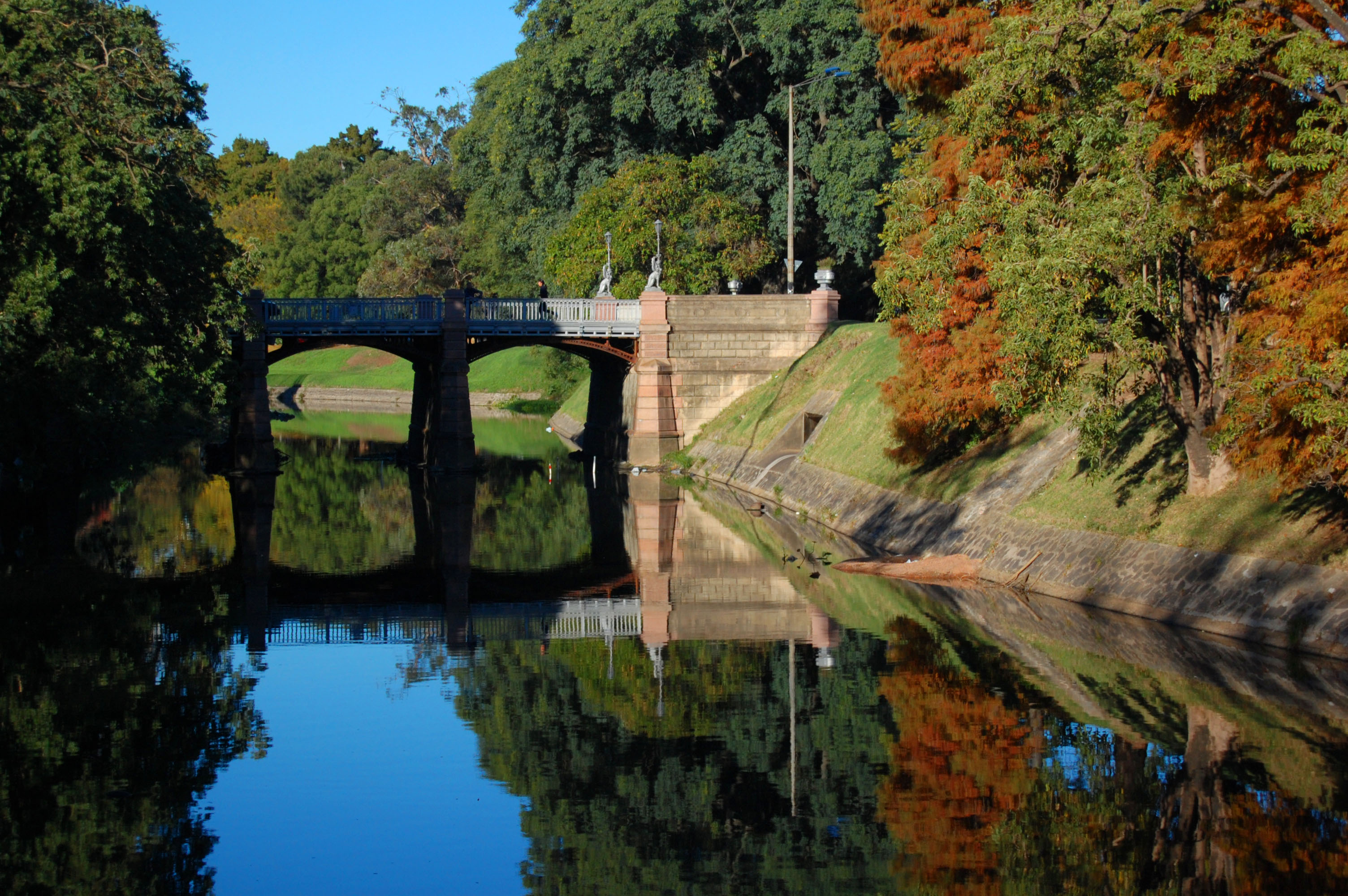 Parque El Prado. Ubicada en el departamento de Montevideo